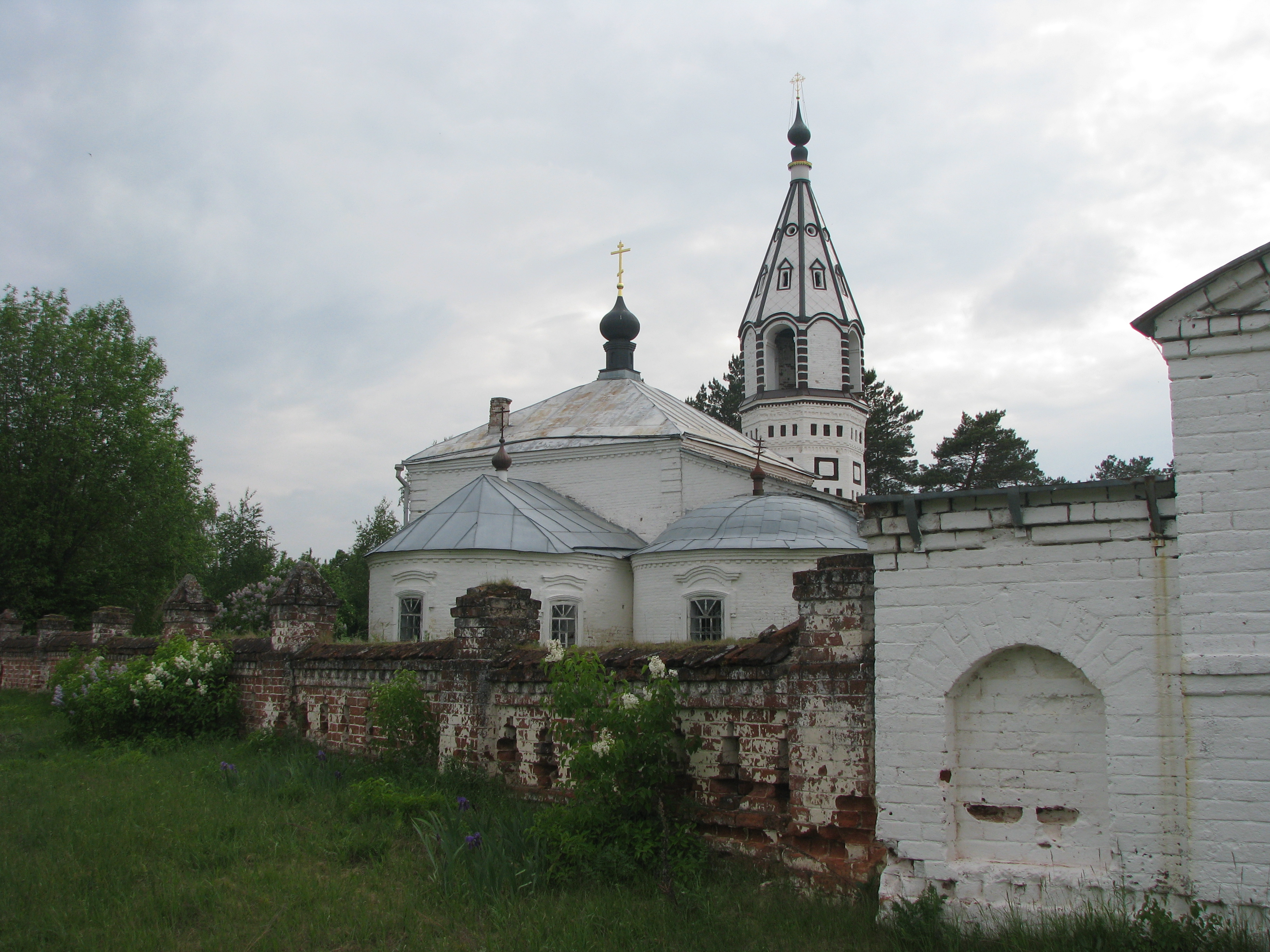 Село Филяндино Савинского района Ивановской области. Церковь Николая Чудотворца. 1794